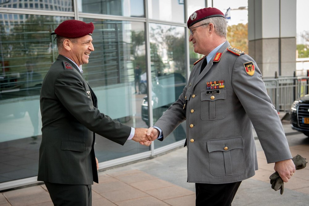 ביקור רמטכ"ל צבא גרמניה, הגנרל אברהרד צורן (* * * *), בישראל כאורחו של הרמטכ"ל רא"ל אביב כוכבי.